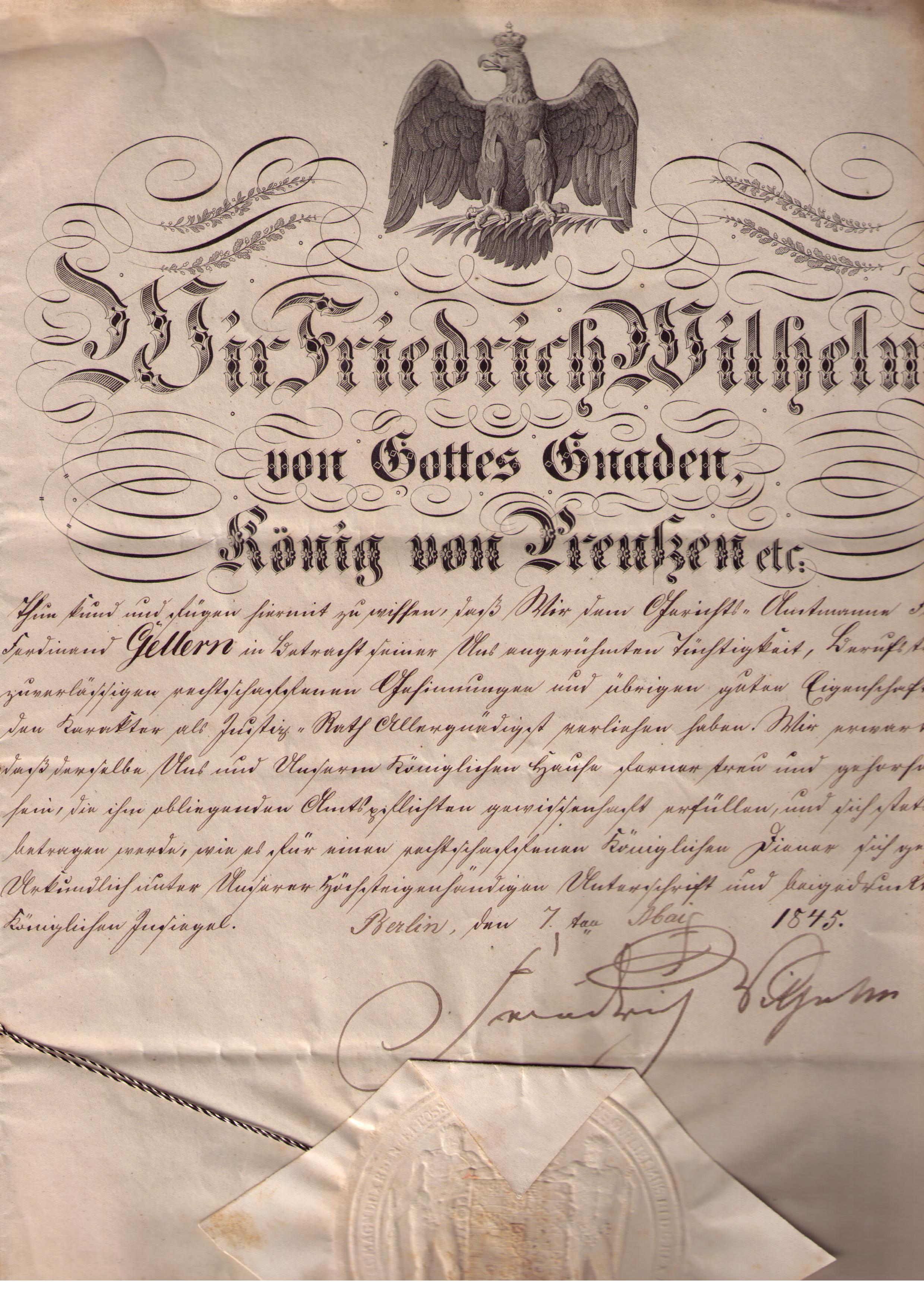 Patenturkunde justizrat gellern